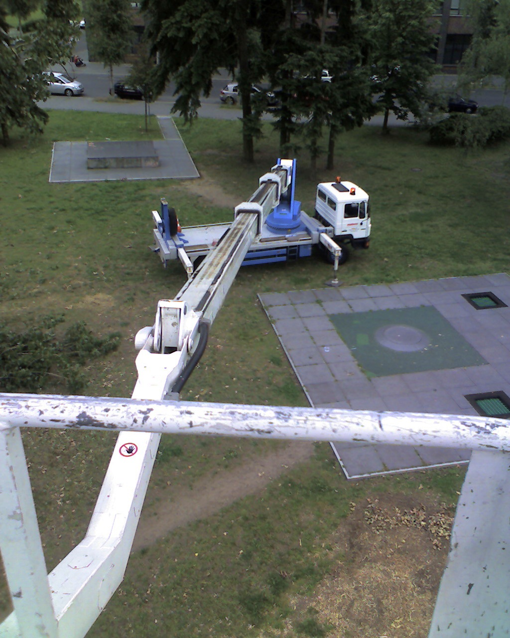 Wumag elevant Hebebühne (WT 350), montiert auf MAN-LKW - hier in maximaler Seitenauslage (ca. 27 m)